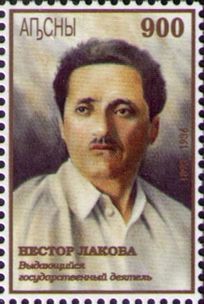 Nestor Lakoba